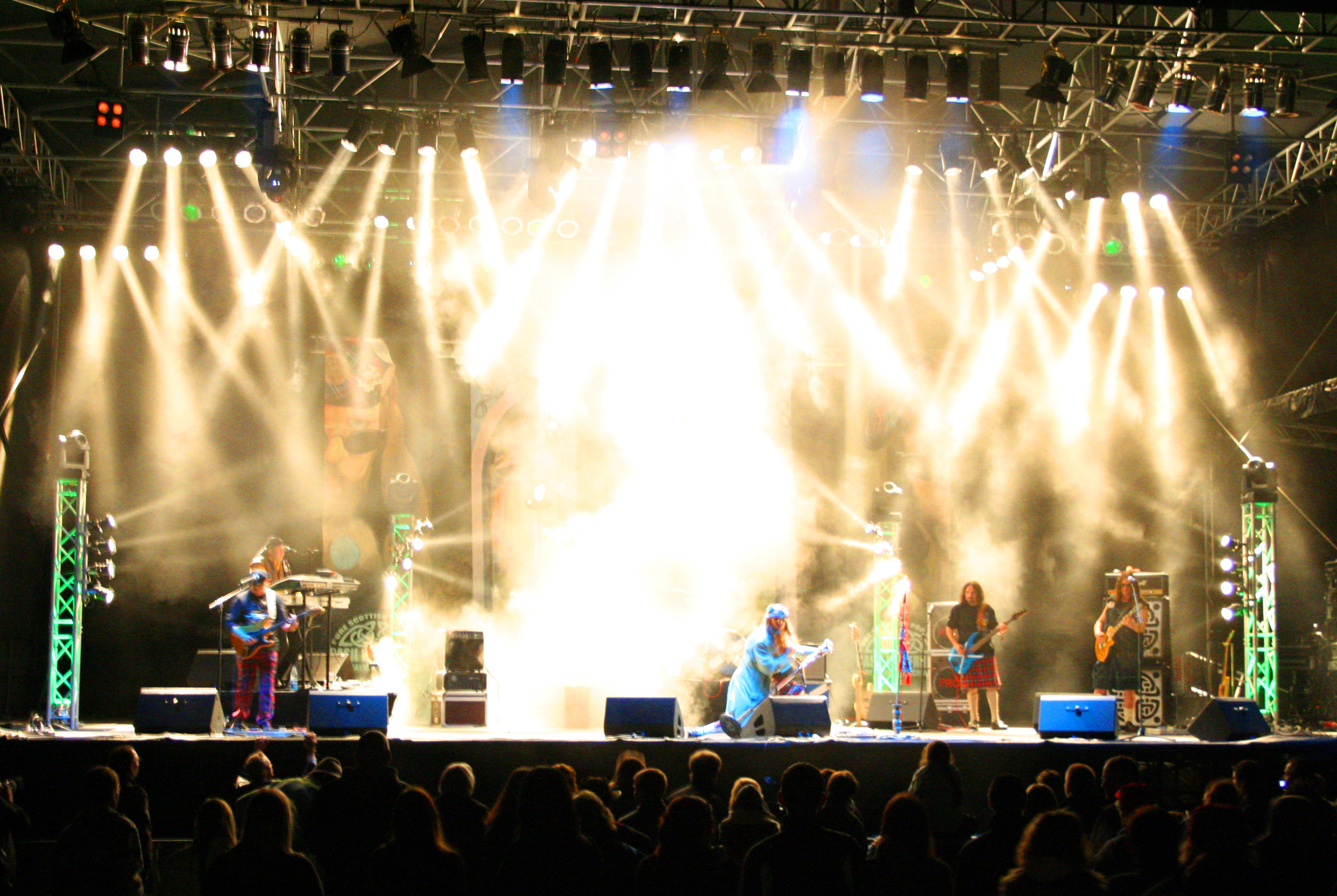 Basil Wolfrhine & The Claymore Highlander live in action